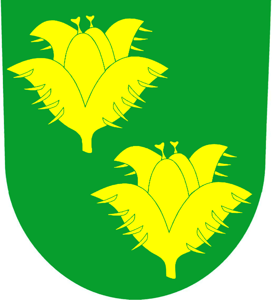 Znak obce Bukvice (okres Jičín)